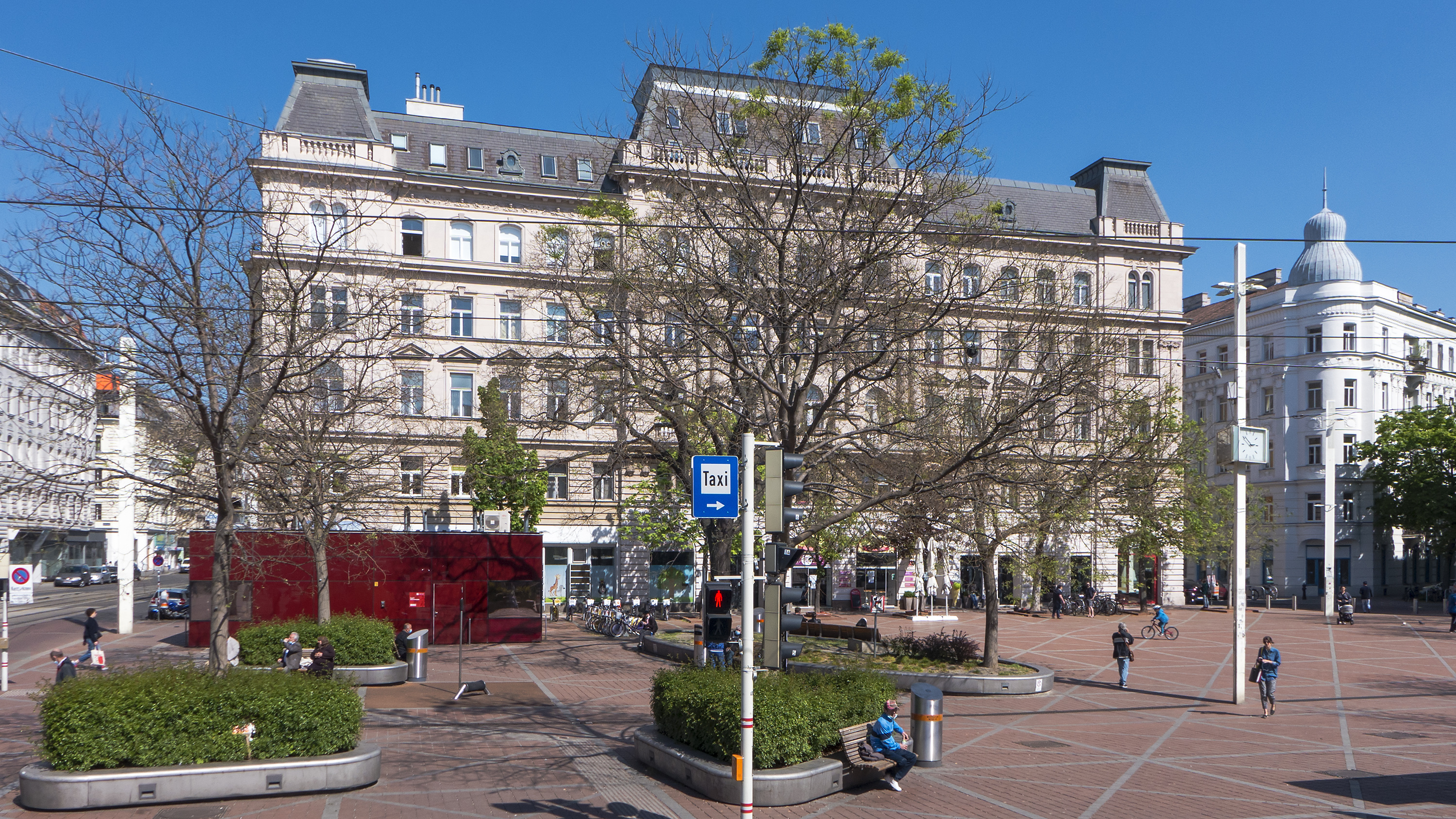 Wallensteinplatz in Wien 20